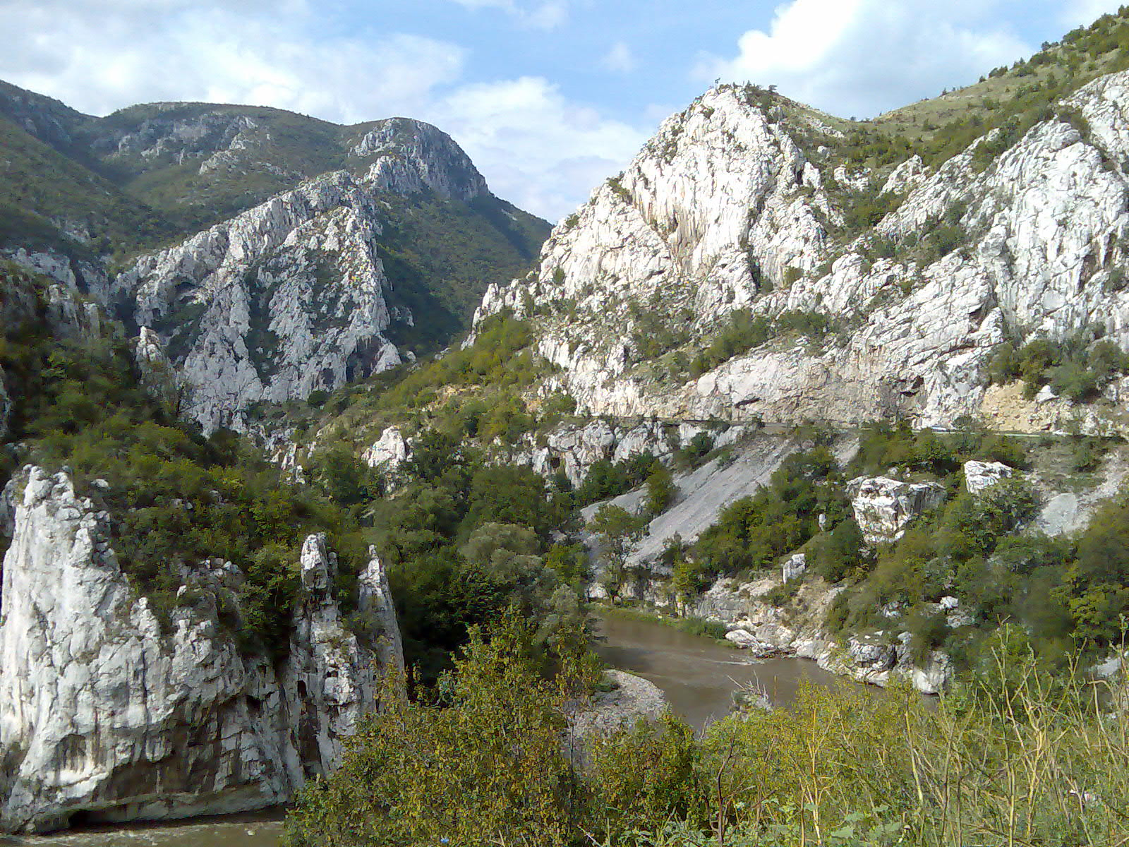 Искърски пролом (Искърско дефиле), Врачанския Балкан.